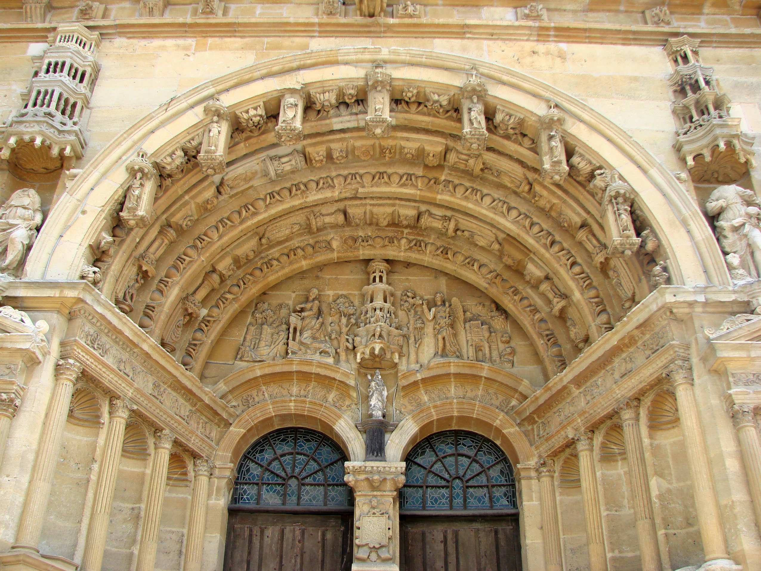 Eglise Saint-Maurille, Vouziers, Ardennes. Son portail Renaissance (milieu XVIème) est très particulier.Tympan du portail central représentant l'Annonciation.